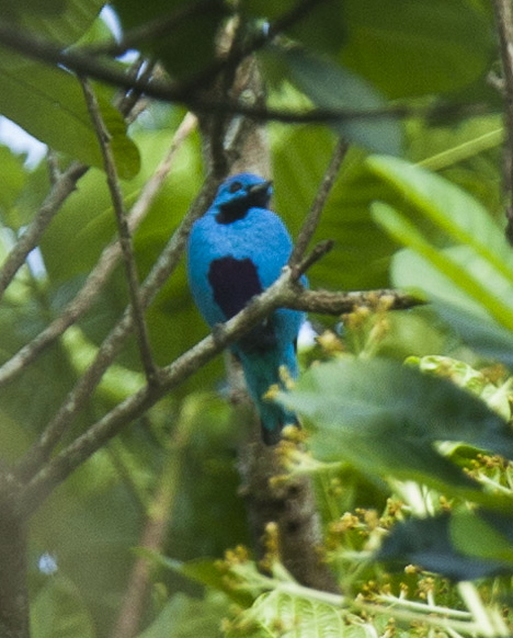 Blue Cotinga - Panama_MG_2171